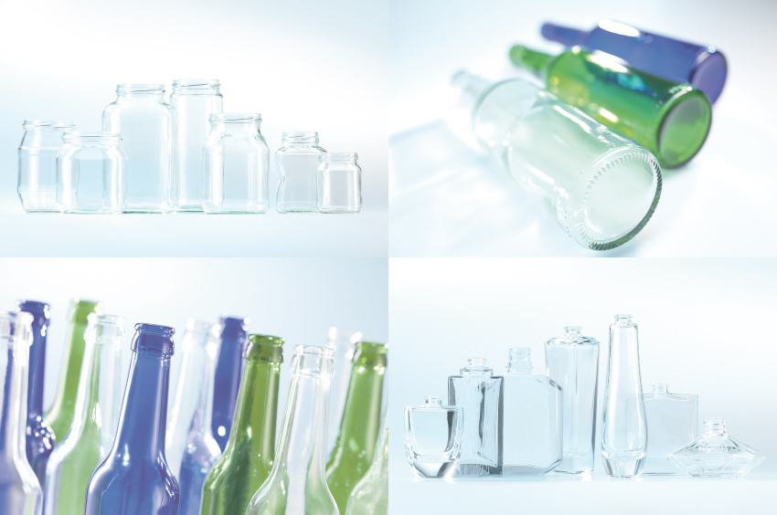 Foto Behälterglas